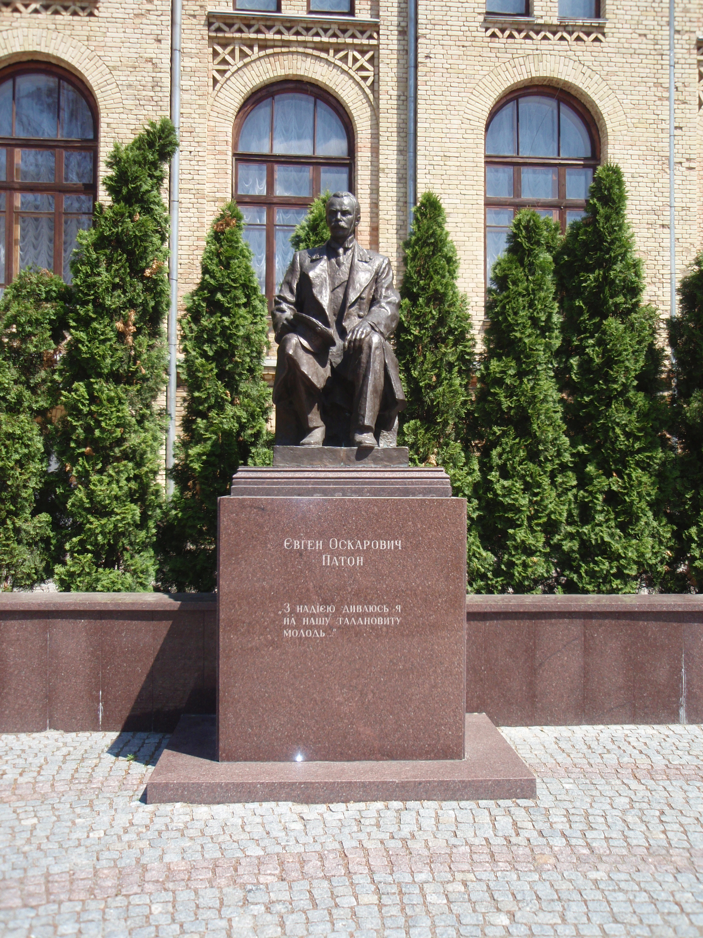 Пам'ятник Є. О. Патону в НТУУ КПІ. Київ, Україна